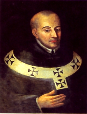 Gonzalo López de Campo o de Ocampo (1572 - 1626) IV Arzobispo de Lima entre 1625 y 1626.